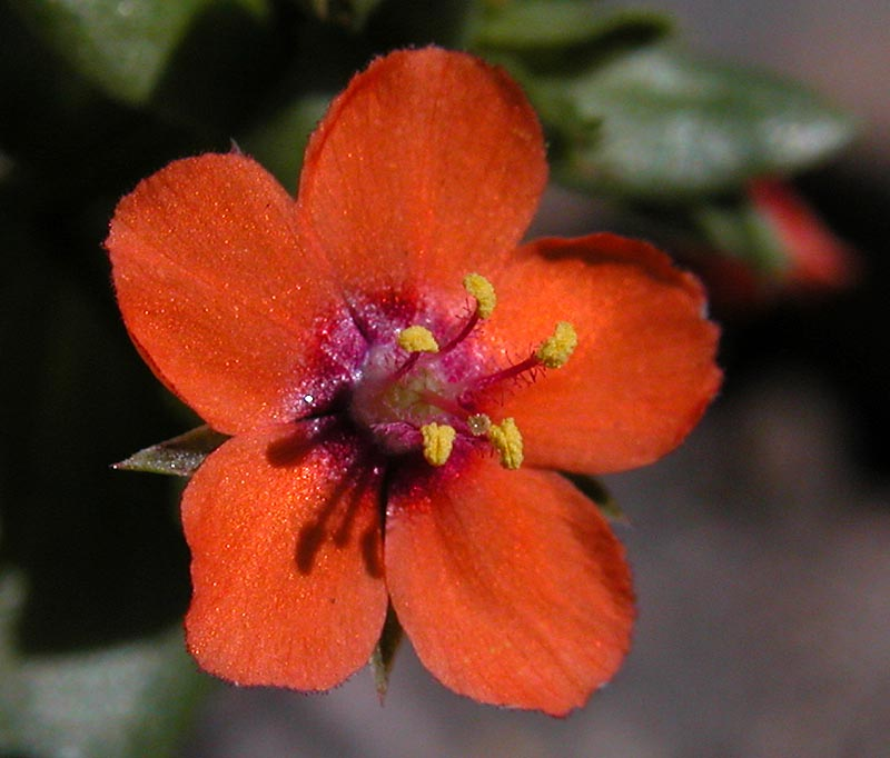 Acker-Gauchheil (Anagallis arvensis), aufgenommen am Mittelstreifen der Autobahn Frankfurt-Würzburg während eines längeren Stauaufenthalts